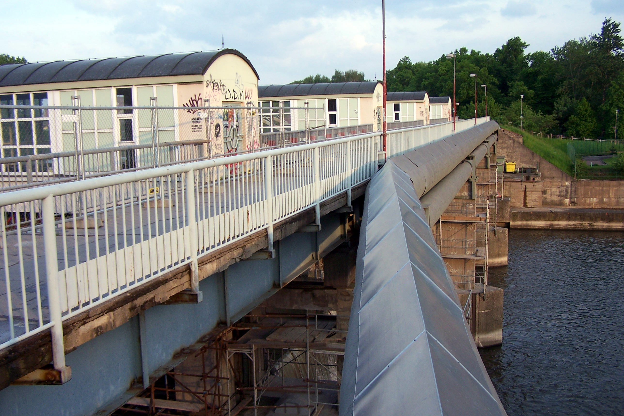 Vodní elektrárna Pardubice